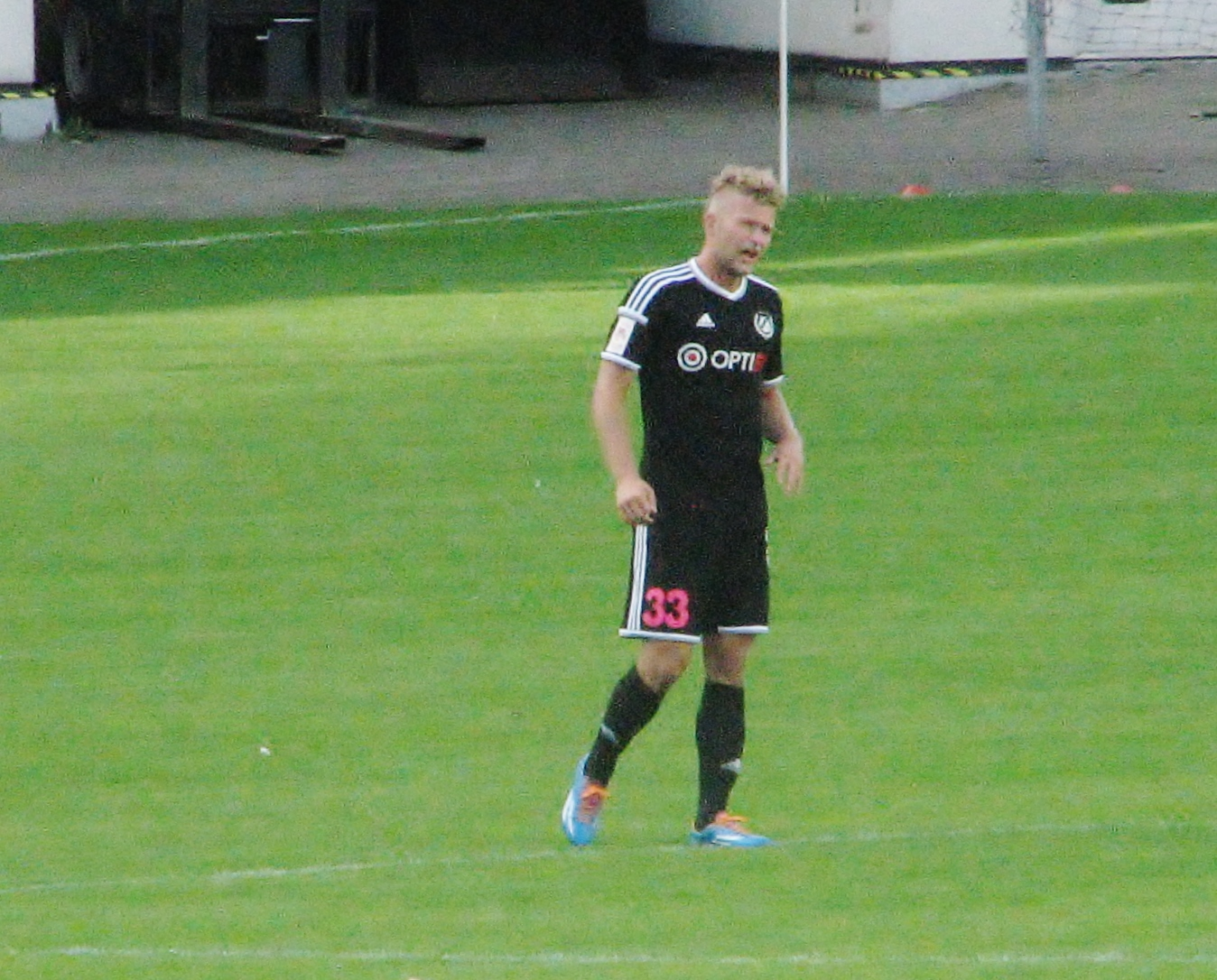 Karl Mööl mängimas FC Flora vastu